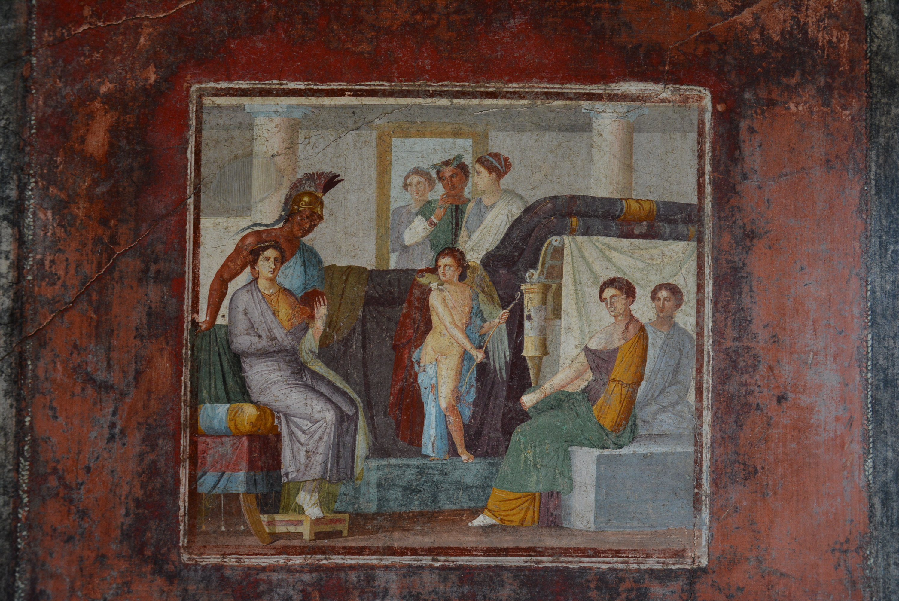 Casa di Marco Lucrezio Frontone - MIBACT This is a photo of a monument which is part of cultural heritage of Italy.